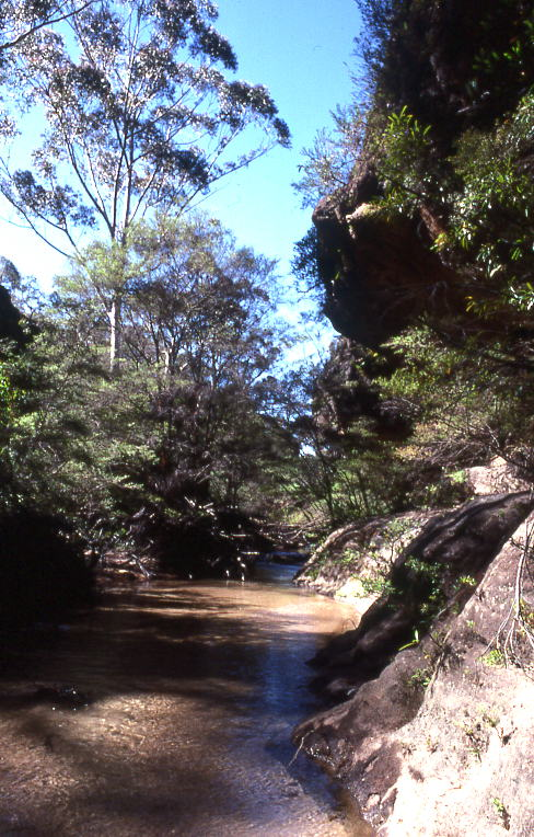 mountains, australia